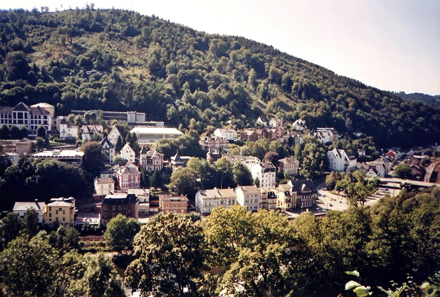 Altena - eine Stadt im Sauerland